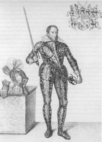 Markgraf Georg Friedrich von Baden-Durlach